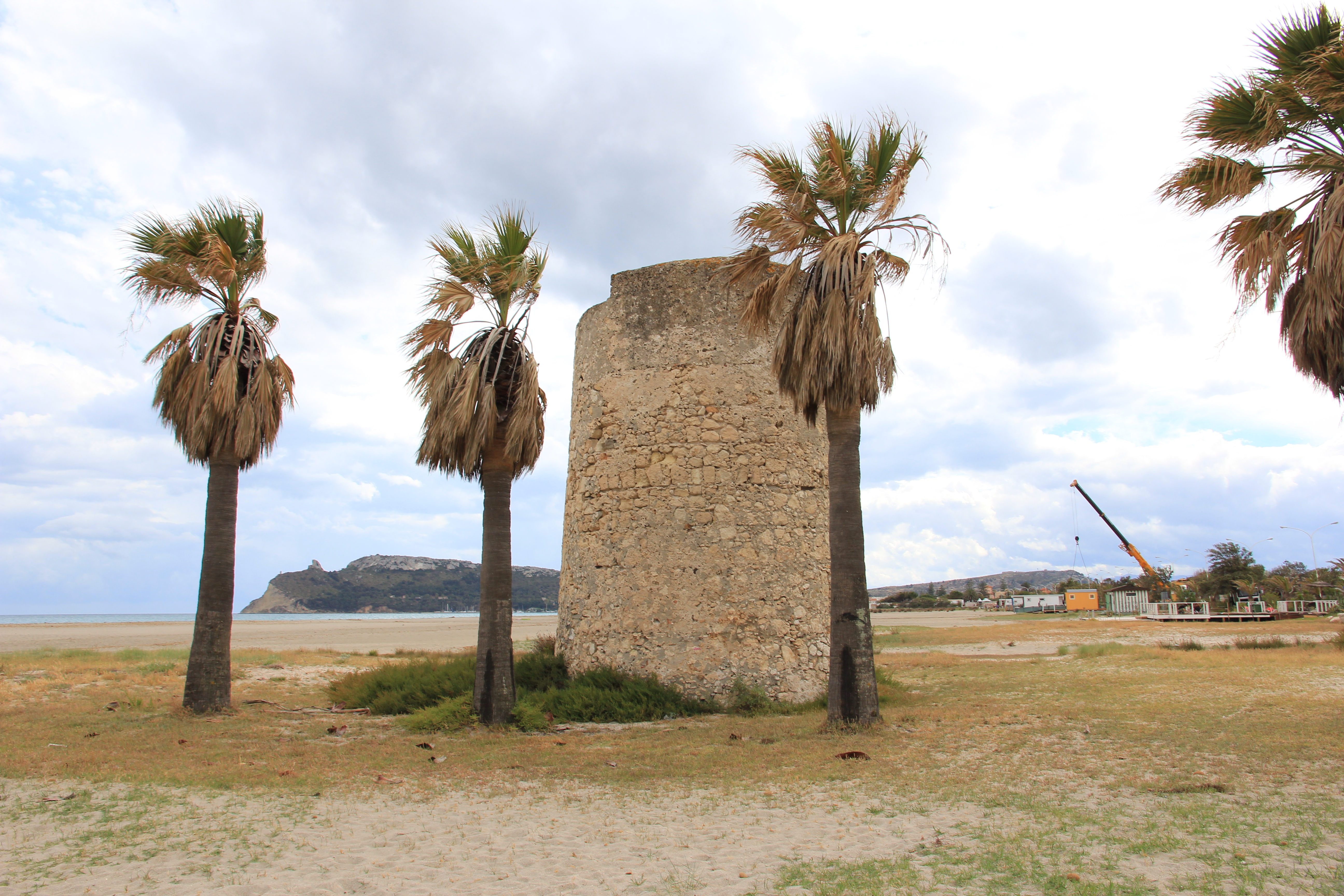 Cagliari - Torre di Mezza Spiaggia